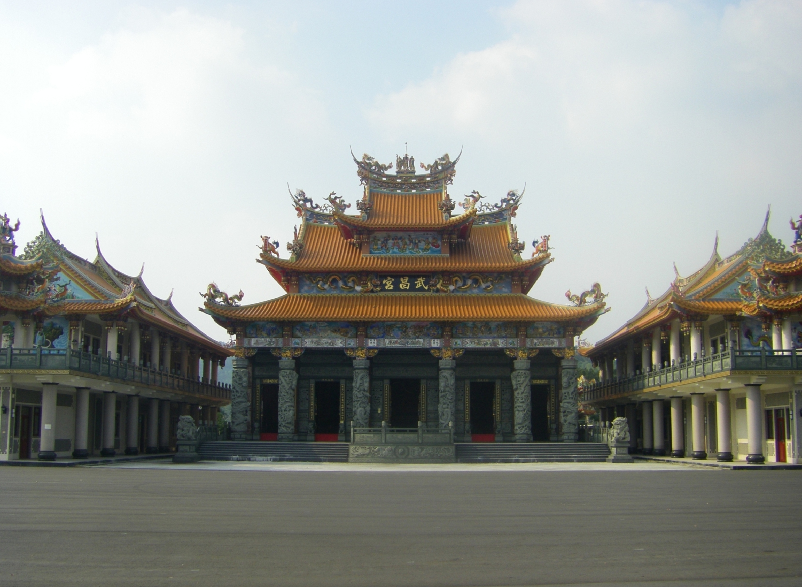 中文（台灣）: 集集鎮武昌宮